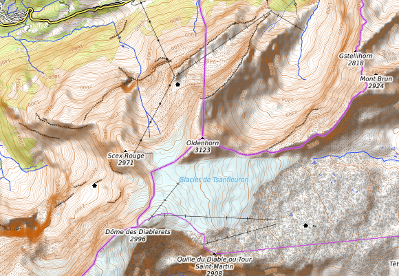 carte réalisée sur umap This map may be incomplete, and may contain errors. Don't rely solely on it for navigation.